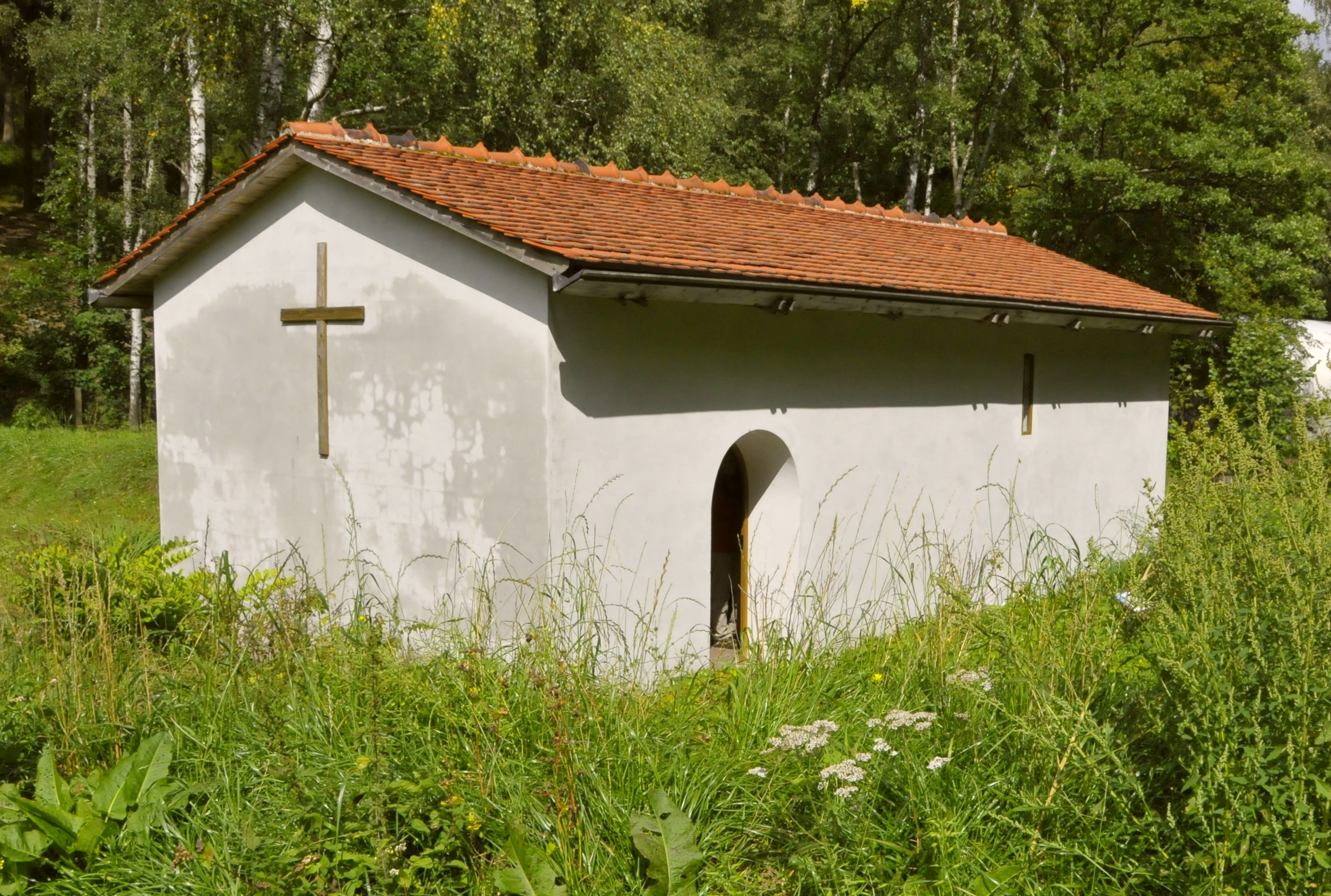 Friedrichroda-Reinhardsbrunn, Johanniskapelle